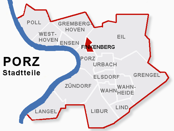 Lage des Stadtteils Finkenberg im Stadtbezik Porz